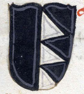 Wappen Salzburger Erzbischöfe aus der Salzburgischen Chronik bis 1587 (für frühe Bischöfe sicherlich apokryph), Universitätsbibliothek Salzburg; Burkhard II. von Weißpriach